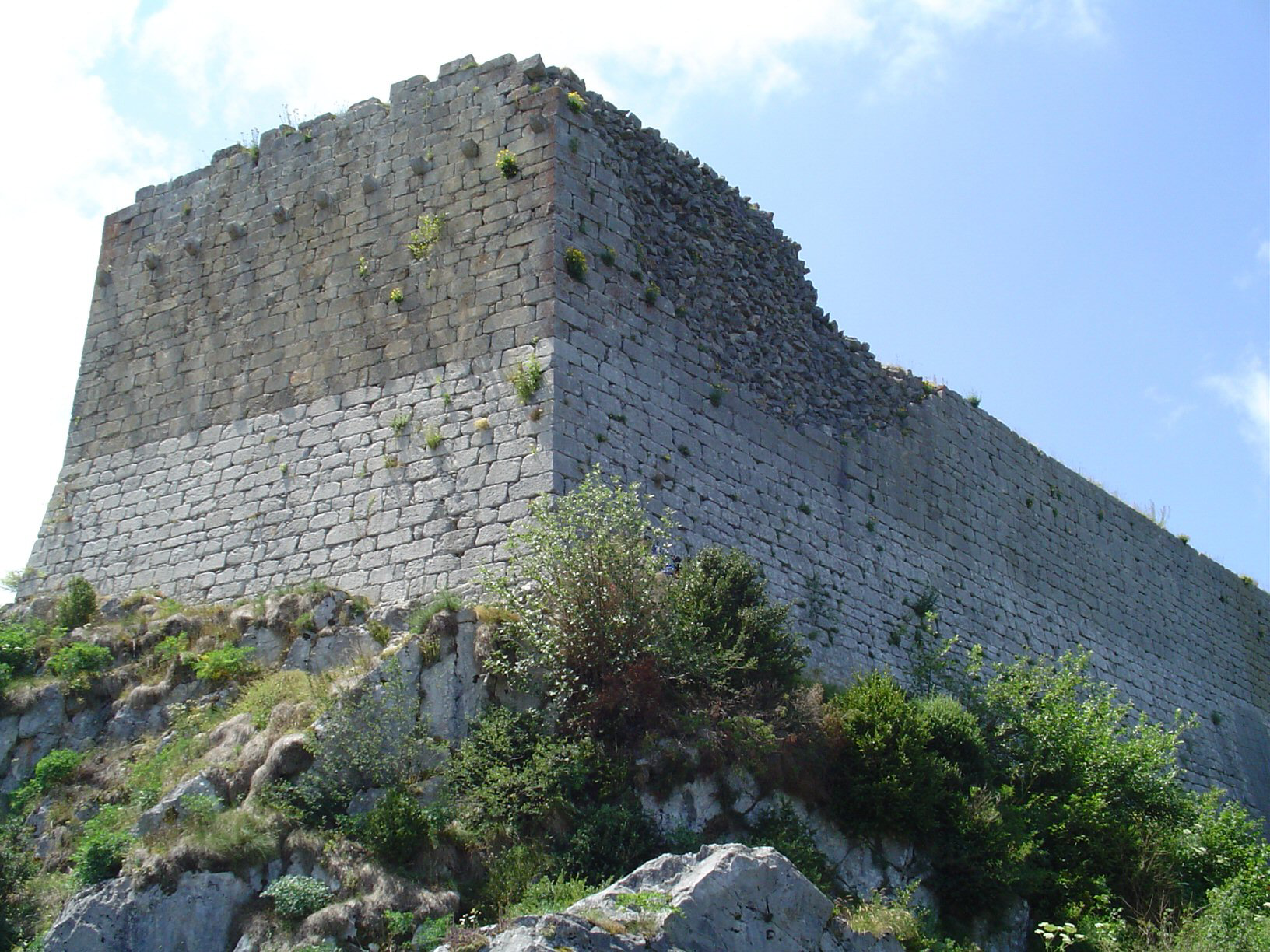 Château de Montségur (France,09)